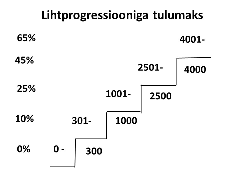 Astmelise maksumäära arvestamine